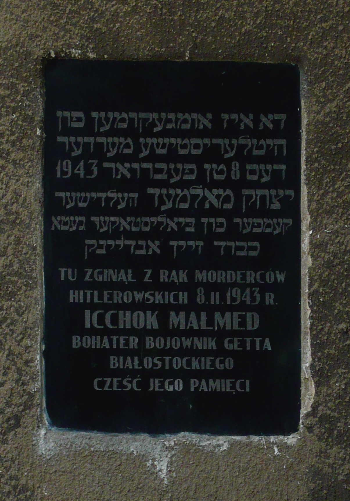 Tabulo memoriganta pri Icĥok Malmed, heroa batalanto en bjalistoka getto, ĉe la strato kun lia nomo.